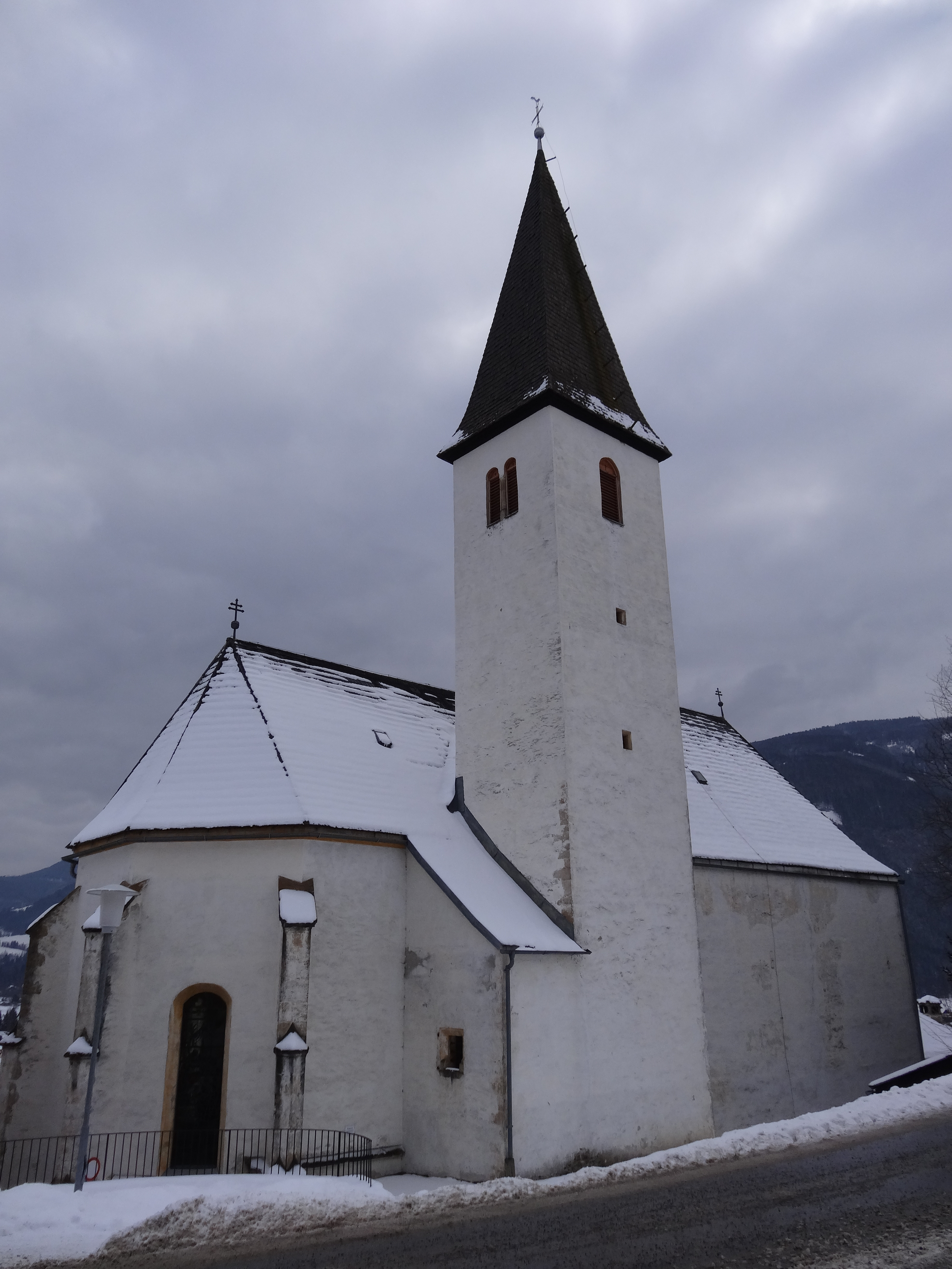 Pfarrkirche hl. Johannes der Täufer, Stadl an der Mur